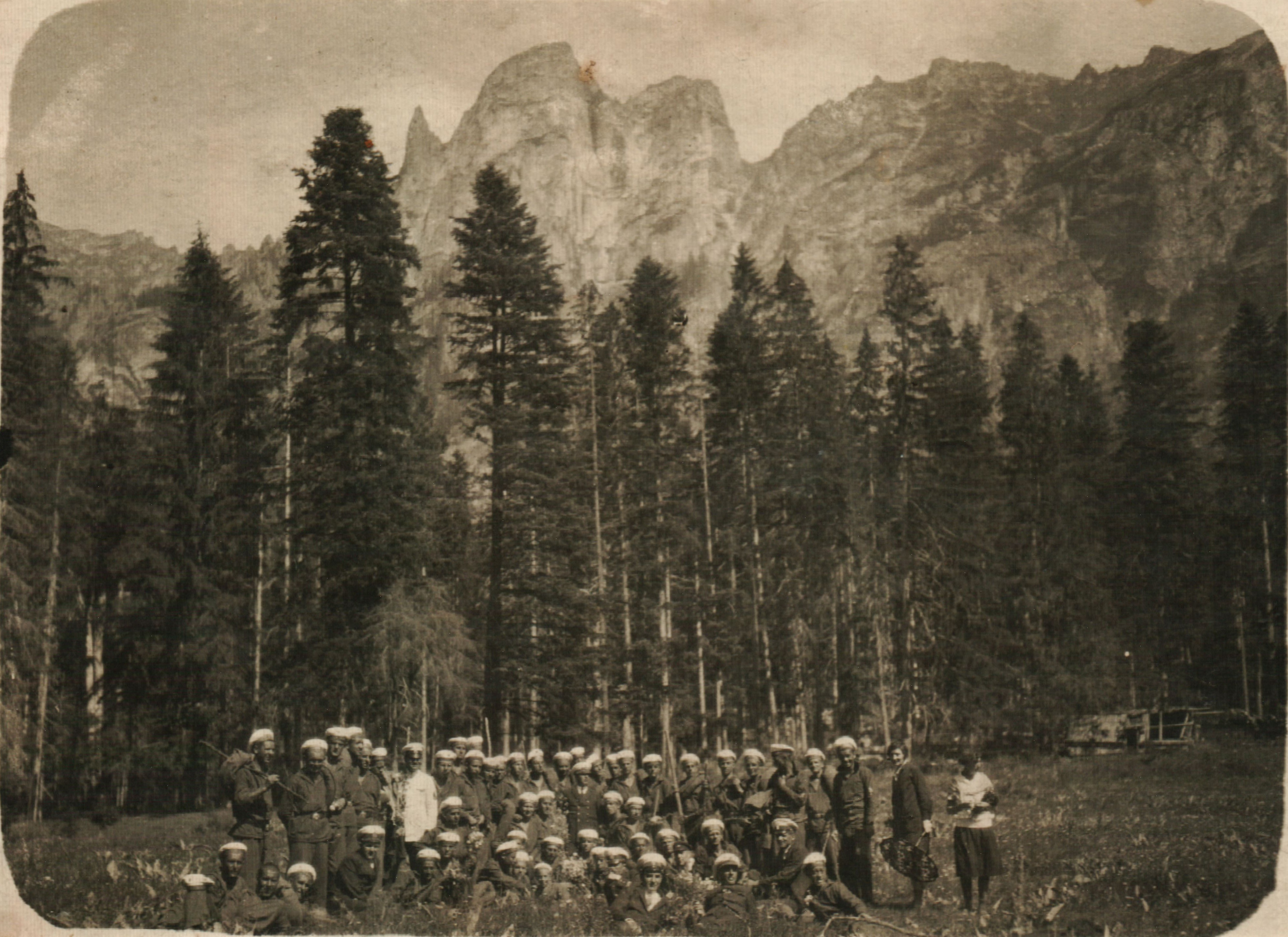 Снимка на Никола Вапцаров с приятели на екскурзия в Рилския манастир. Традиция беше след всяко завършване на матурата двете морски училища, Специални школи и машинно училище да правят обиколка на България. Нашите випуски направихме тази голяма екскурзия през 1929 г. Снимката е направена в околностите на Рилския манастир (Кирилова поляна). Вапцаров е трети от ляво надясно, прав.